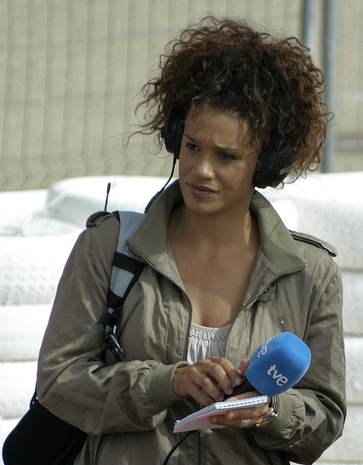 En el Circuito de Albacete, desde el otro lado de la pista, con el 70-300mm a 263mm (526mm en 35).